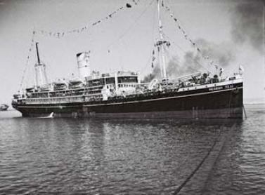 Negba Ship